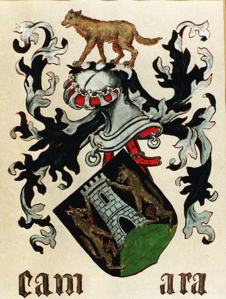 Brasão de armas da família Câmara Tinta de ouro e têmpera sobre papel pergaminho, 25 X 25 cm. Execução segundo o Livro do Armeiro-Mor, século XVI, 1520 (c.) Antigo Museu da Cidade do Funchal, n.º 4, p. 8.